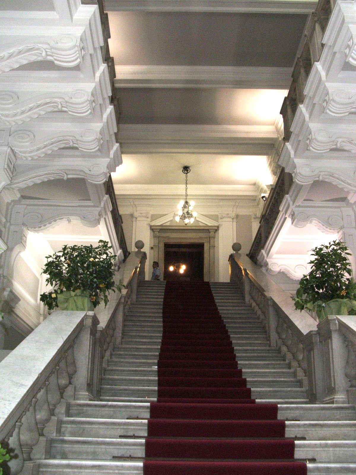 Palazzo San Giorgio (Genova), scalone d'onore